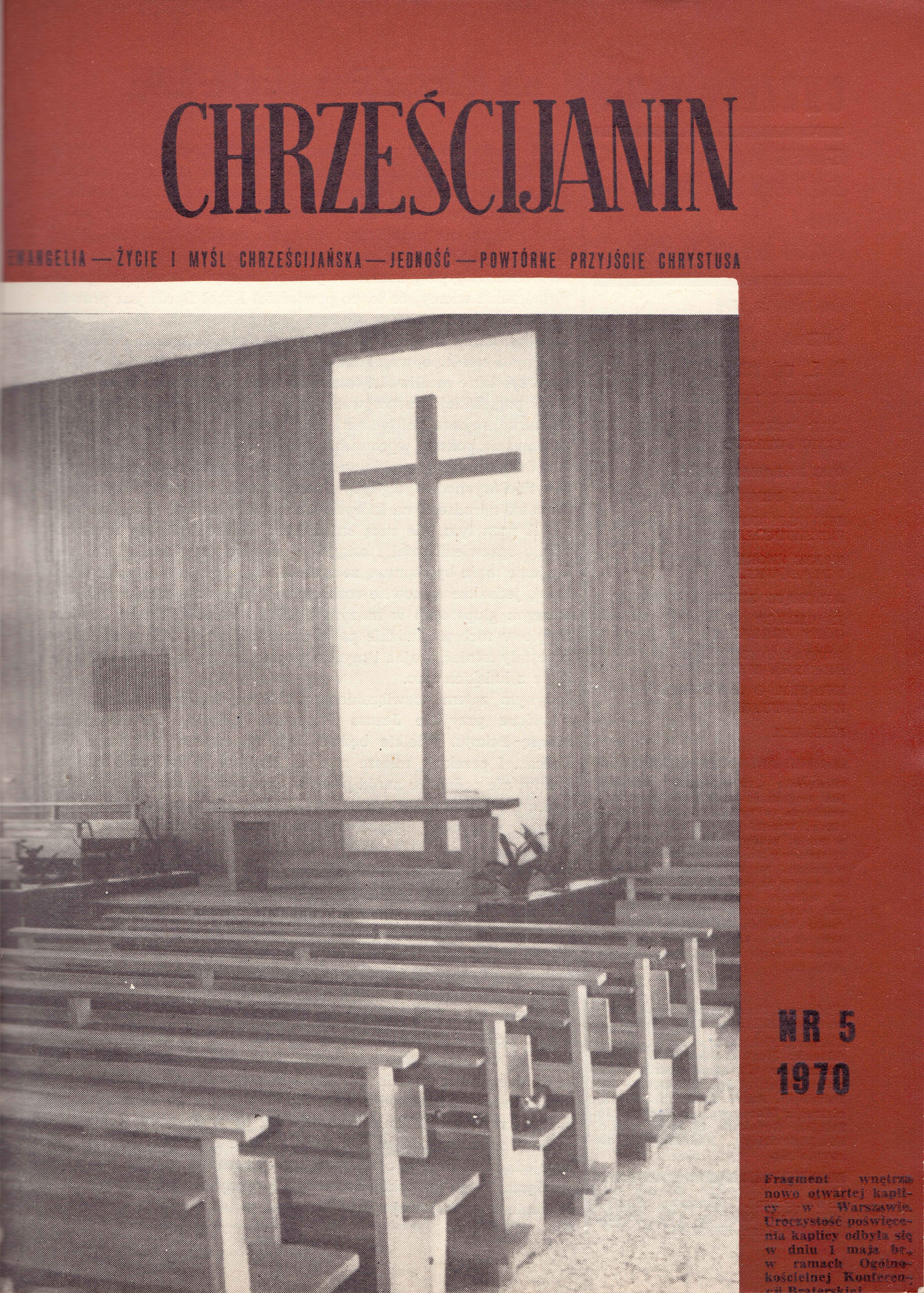 okładka majowego numeru miesięcznika "Chrześcijanin"